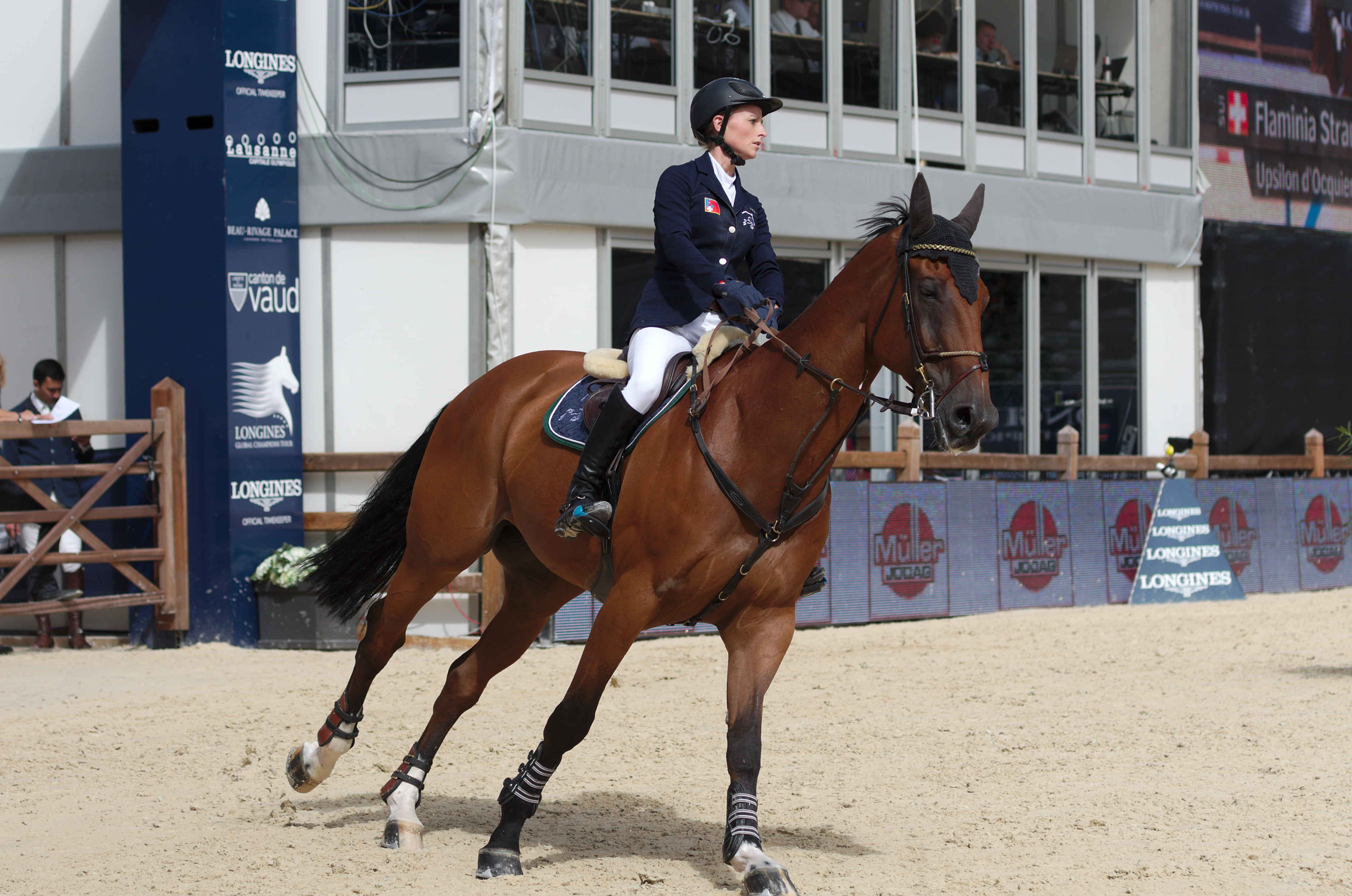 2013 Longines Global Champions - Lausanne - 14-09-2013 - Flaminia Straumann et Upsilon d'Ocquier